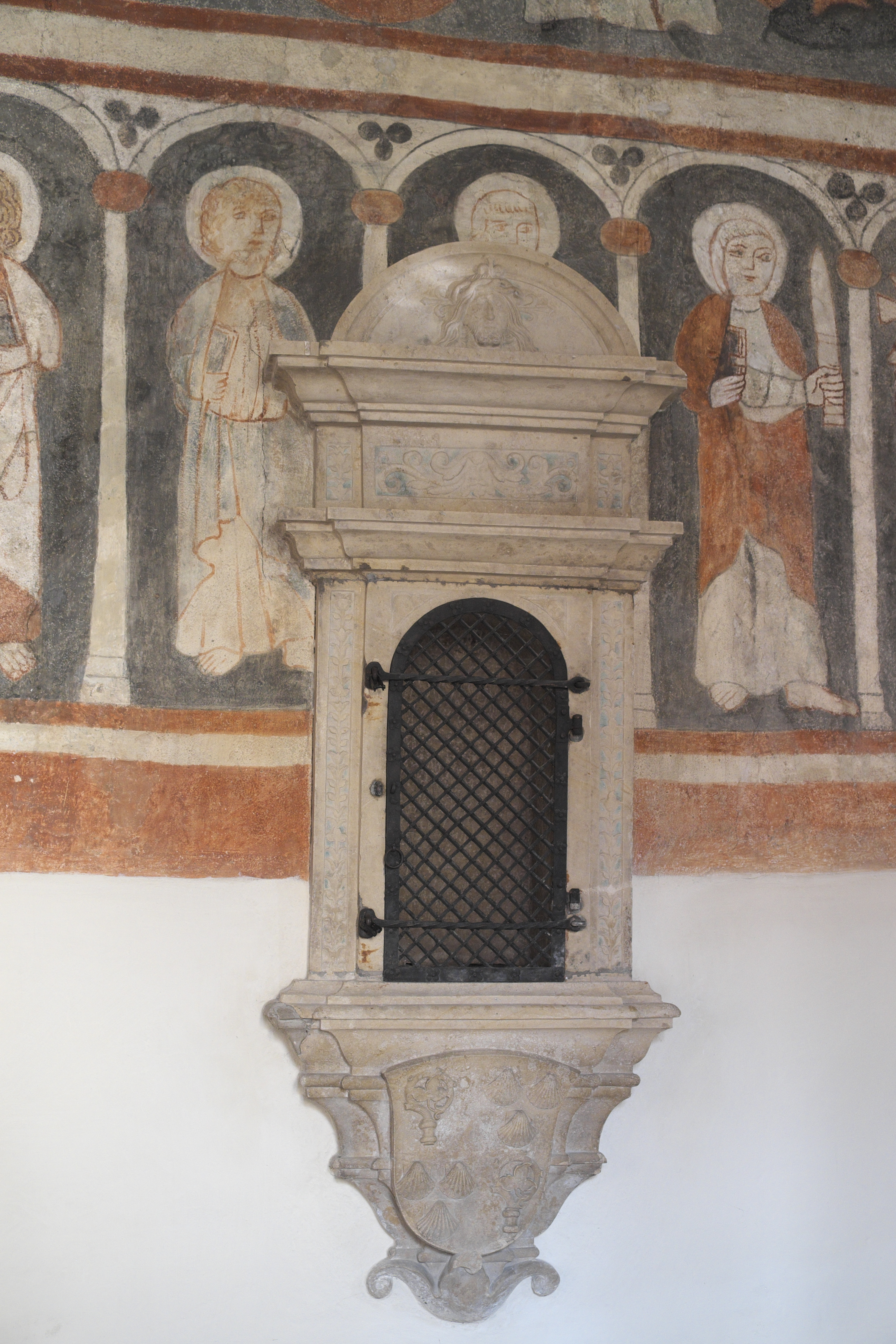 Katholische Pfarrkirche St. Vitus in Kottingwörth (Beilngries) im oberbayerischen Landkreis Eichstätt (Bayern/Deutschland), Sakramentshaus von Loy Hering, um 1520